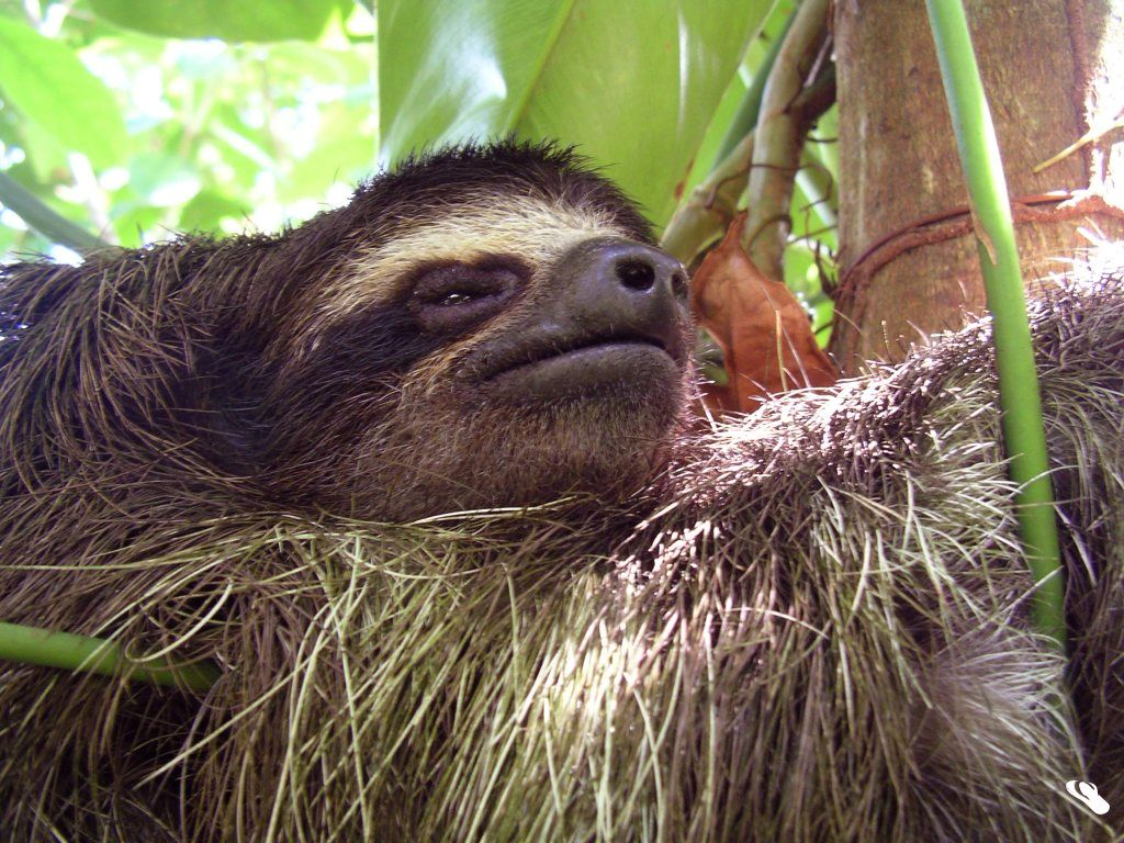 Perezoso enano de Escudo de Veraguas